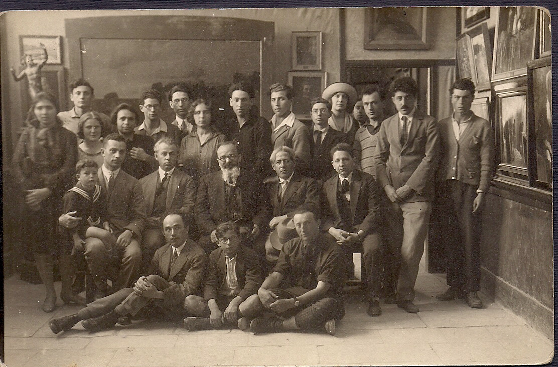 תלמידים בתמונת מחזור ב"בצלאל" עם הפרופסור בוריס שץ. משה שטרנשוס עומד שלישי מצד ימין